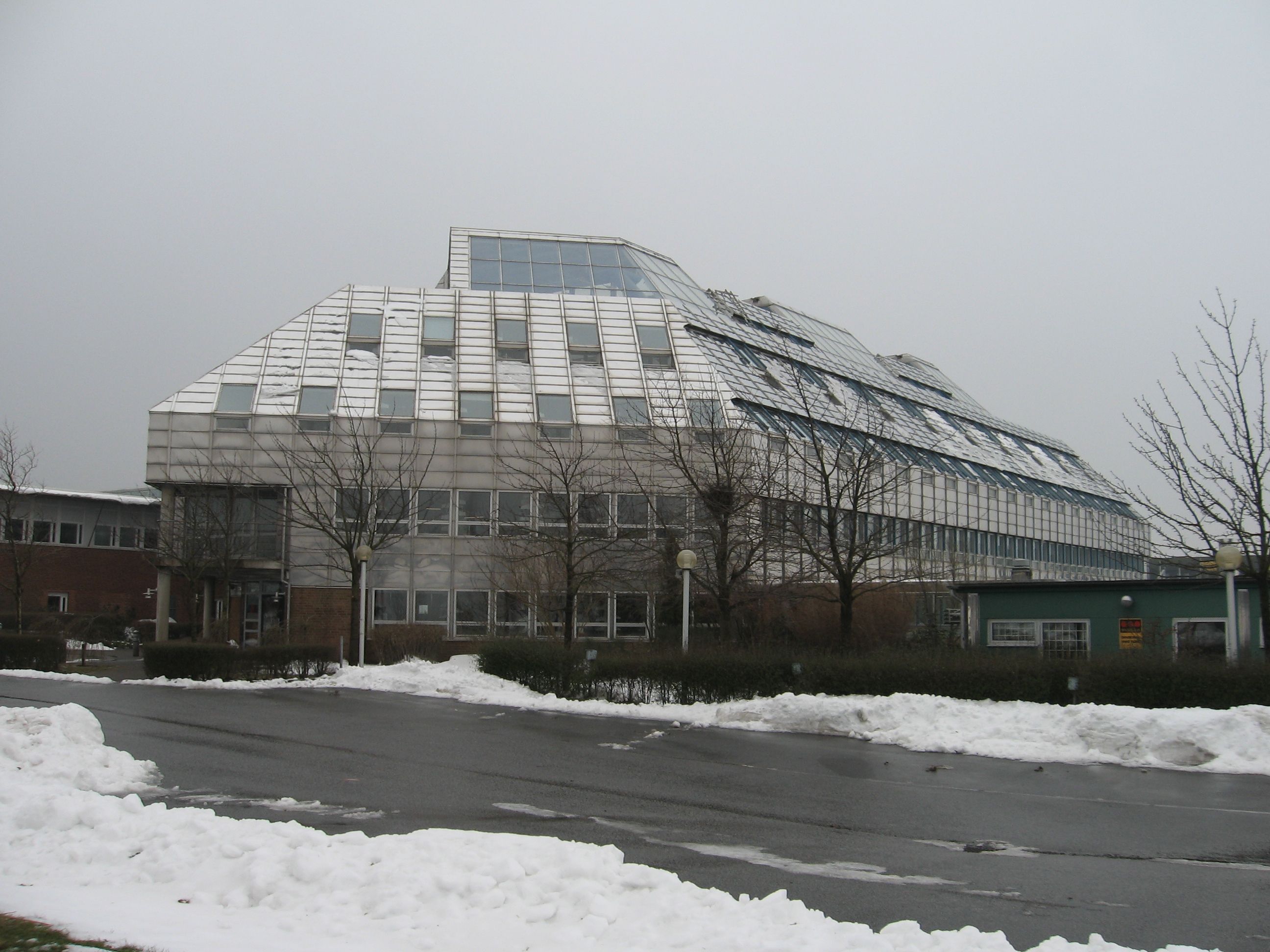 BTJ i Lund